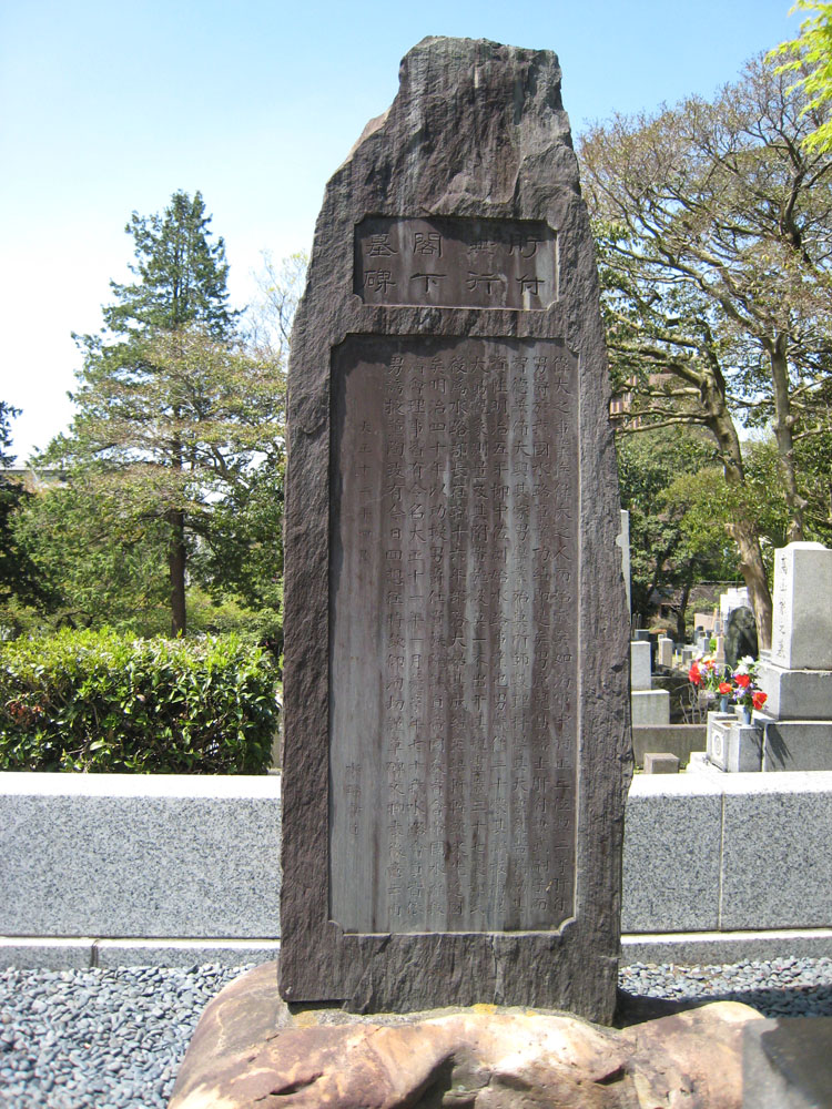 青山墓地に水路会員が建立した肝付兼行の墓碑